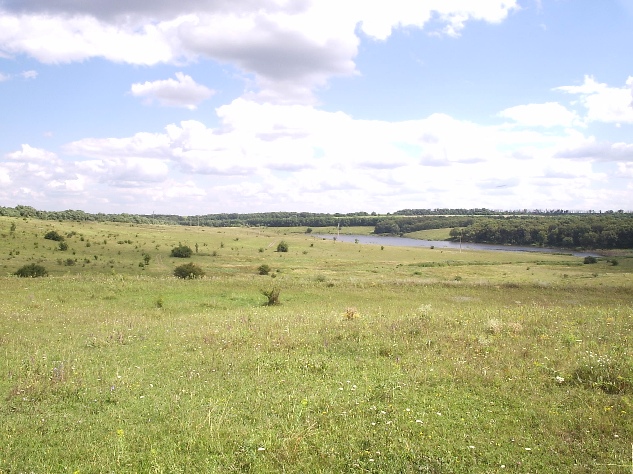 Антонвский ставок Пруд, расположенный близь села Антоновка Старобельского района